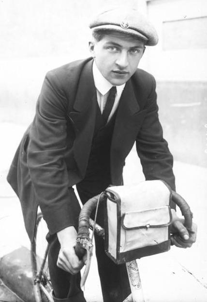 René Guénot portrait du coureur cycliste en tenue de ville sur son vélo.